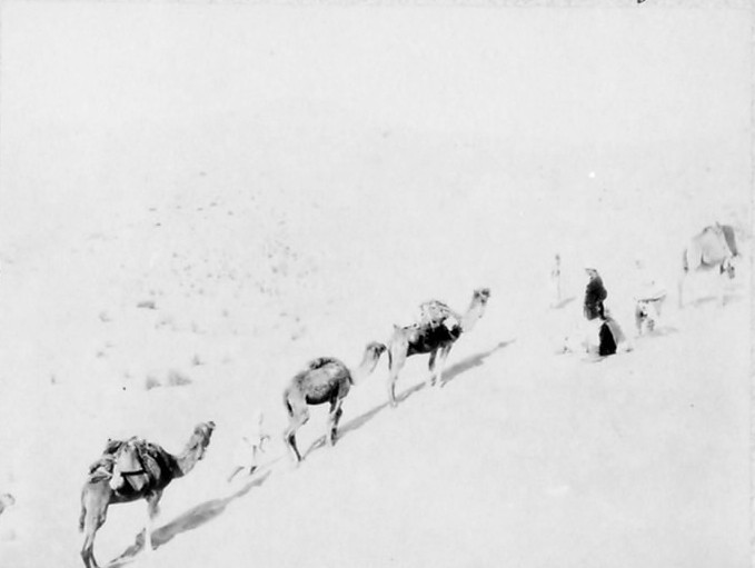 Mission Méry 1893 - Marche dans les dunes